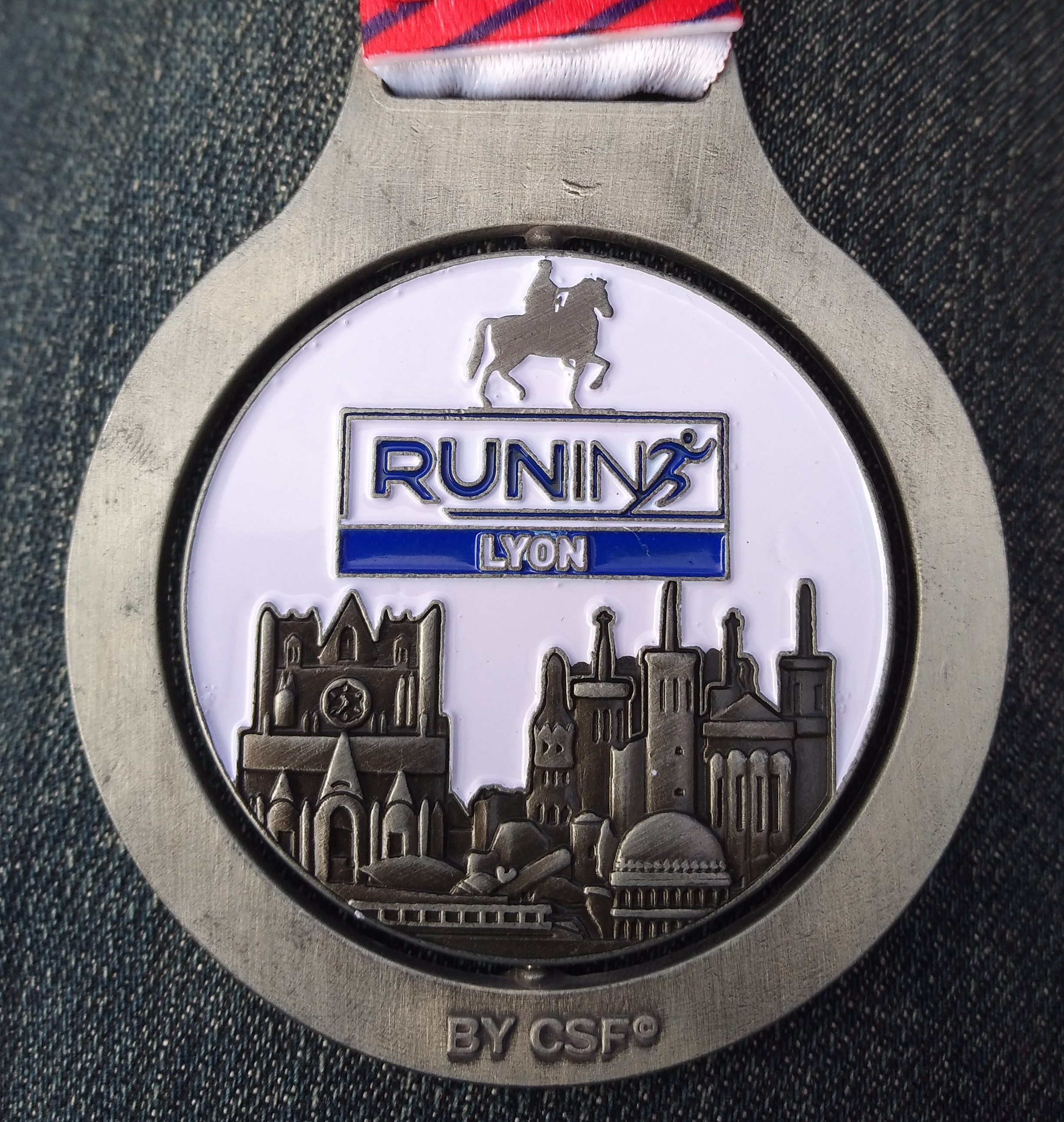 Médaille donnée aux finishers du semi-marathon lors du Run in Lyon 2019.